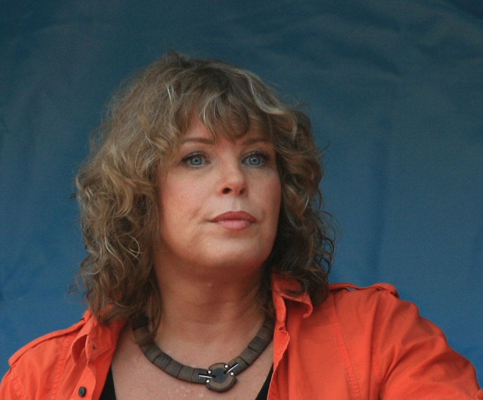 Нателла Болтянская в августе 2011 года во время митинга на Пушкинской площади в Москве.